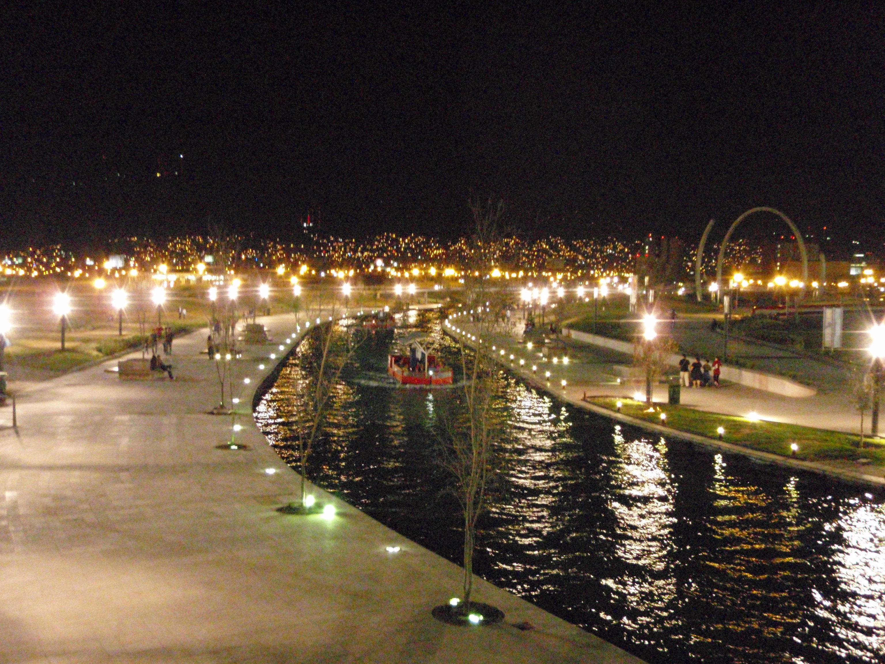 MTY 2008-02-03 Paseo Santa Lucía.